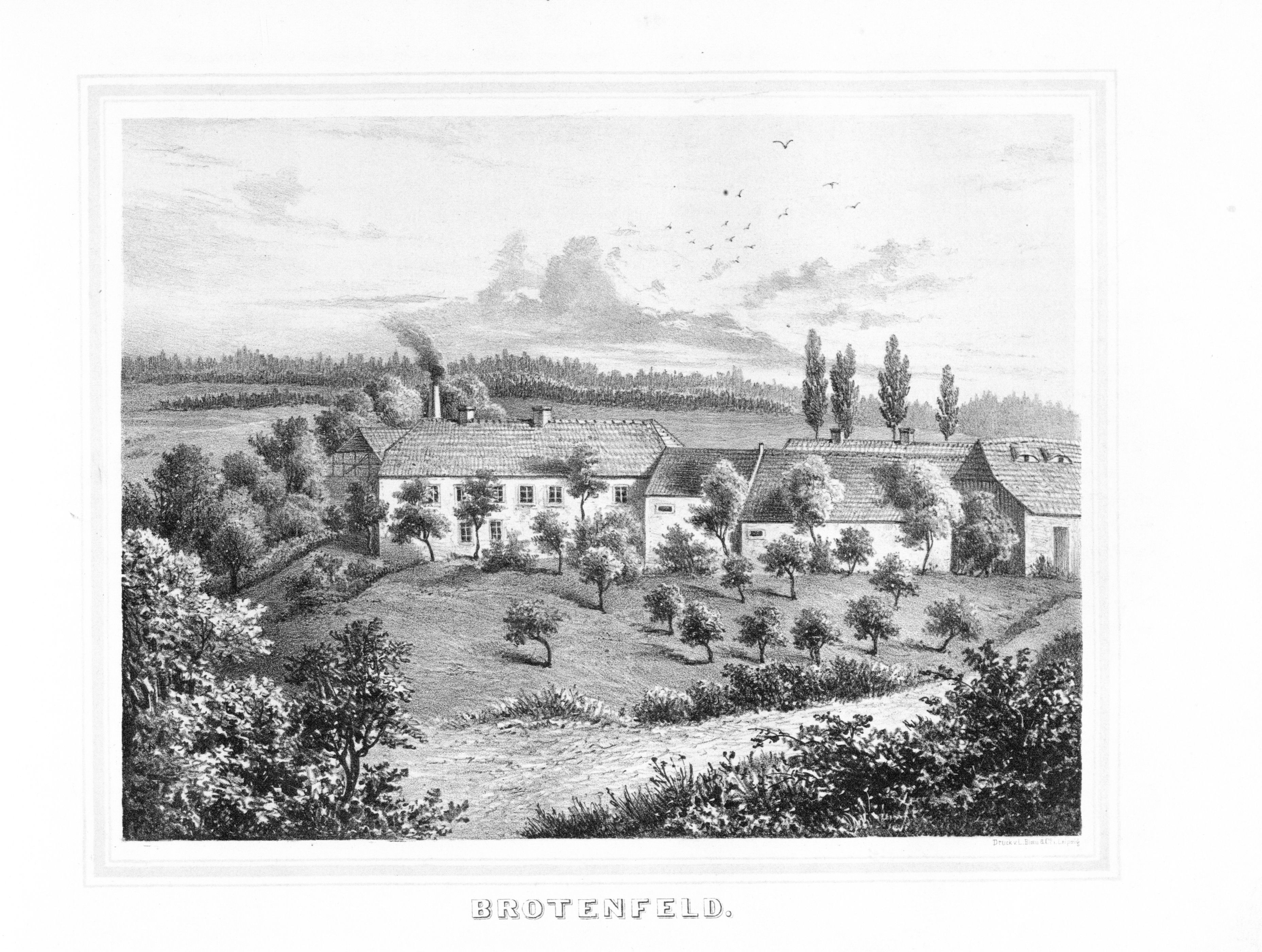 Brotenfeld aus: Album der Rittergüter und Schlösser im Königreiche Sachsen Voigtländischer Kreis Section: V